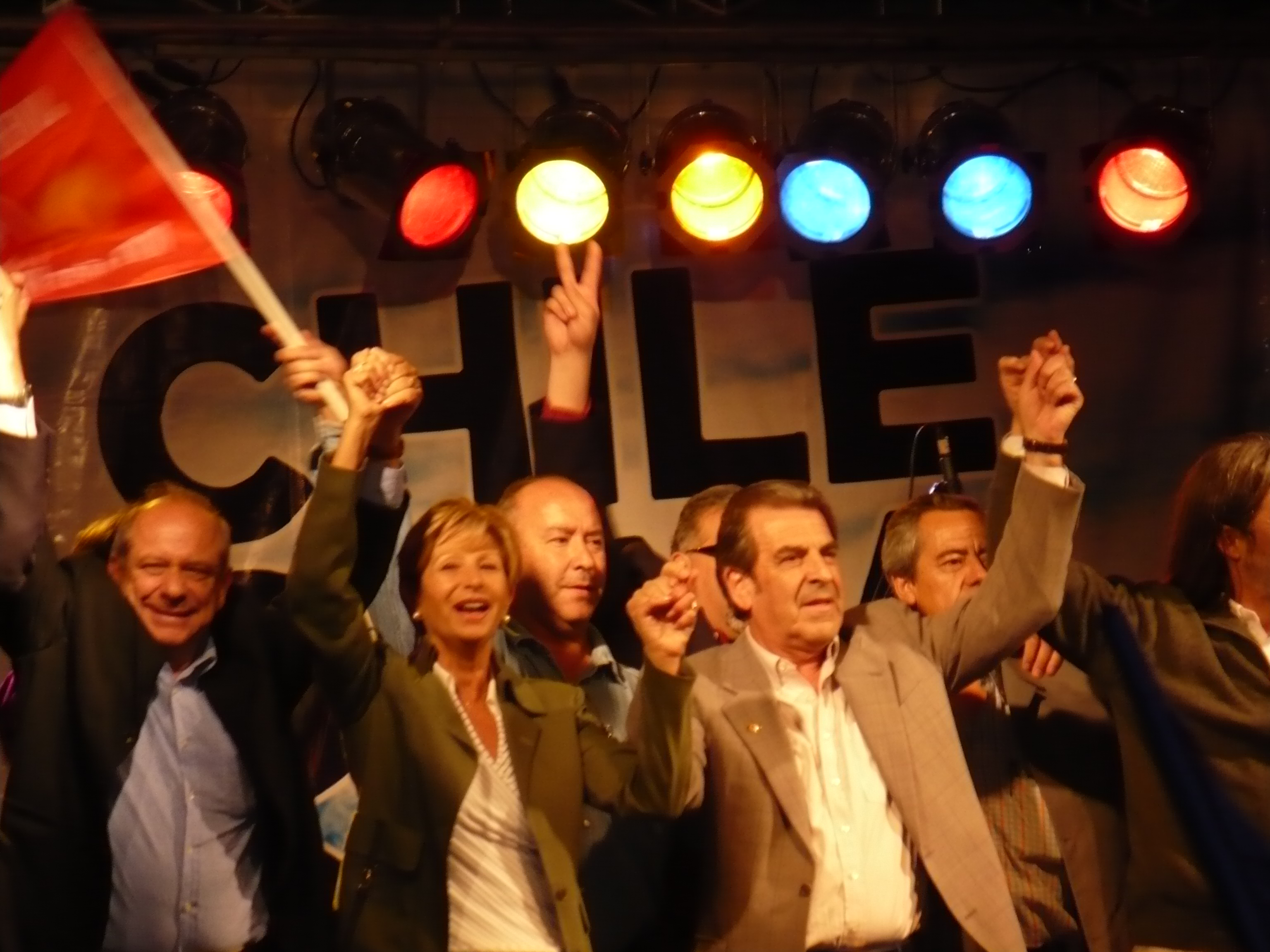 Cierre de campaña de las Primarias Presidenciales de 2009 de Eduardo Frei Ruiz-Tagle en Rancagua.